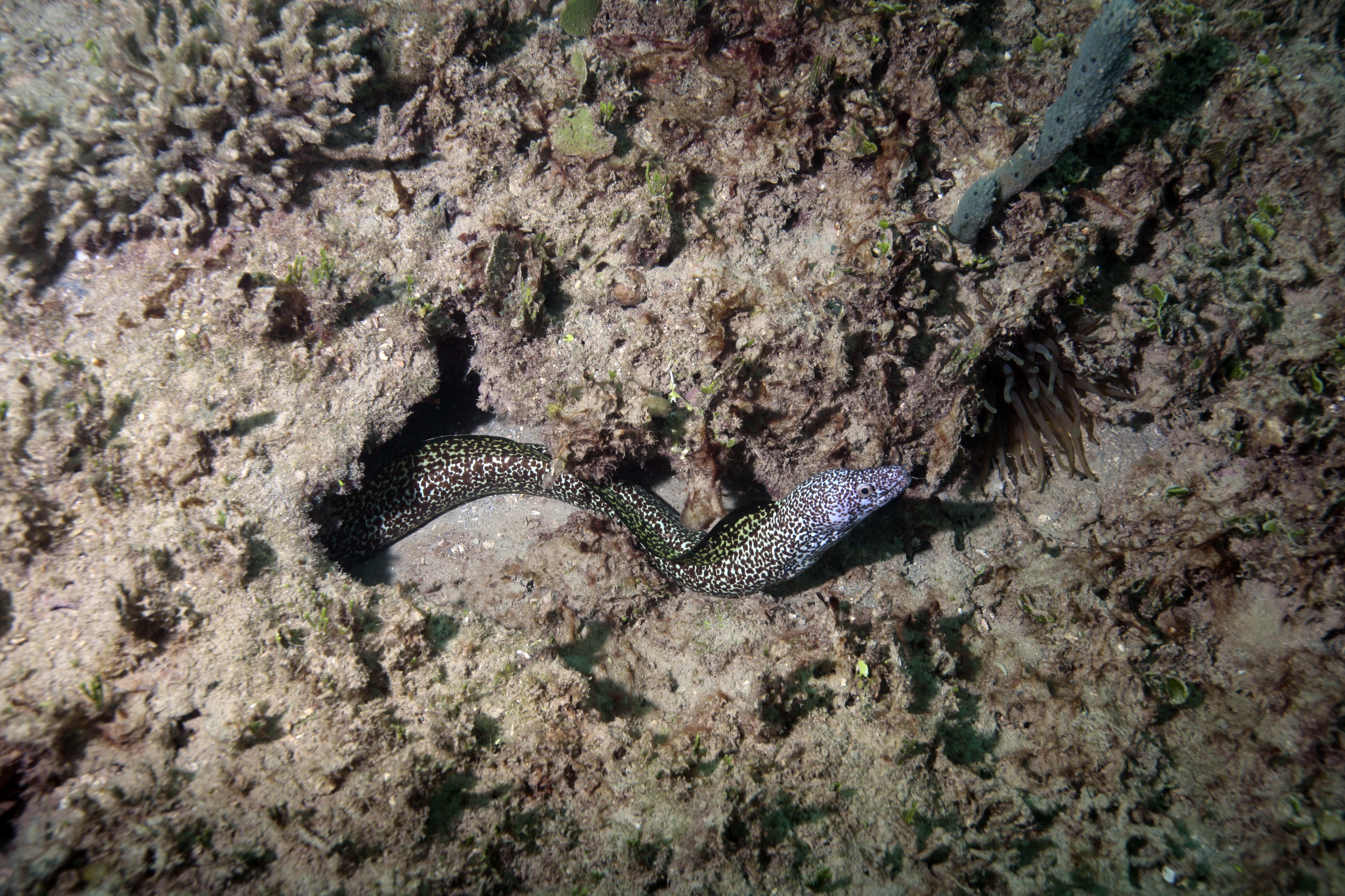 Gymnothorax moringa